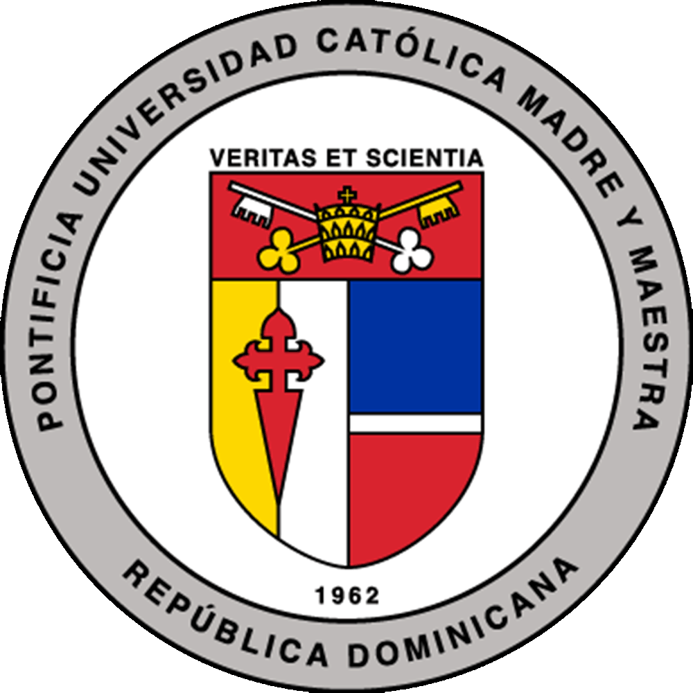 Logo Oficial PUCMM